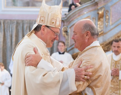 Bischof Alois Schwarz mit Gottfried Riepl bei dessen Diakonieweihe im Klagenfurter Dom